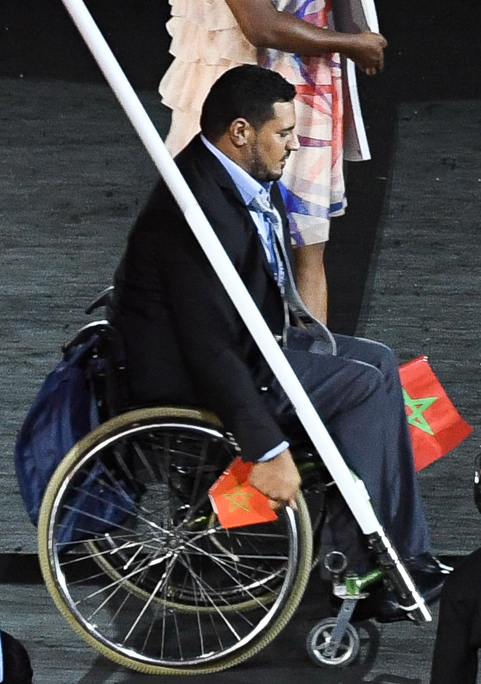 Rio de Janeiro - Cerimônia de abertura dos Jogos Paralmpicos Rio 2016 no Estdio do Maracanã (Tomaz Silva/Agência Brasil)